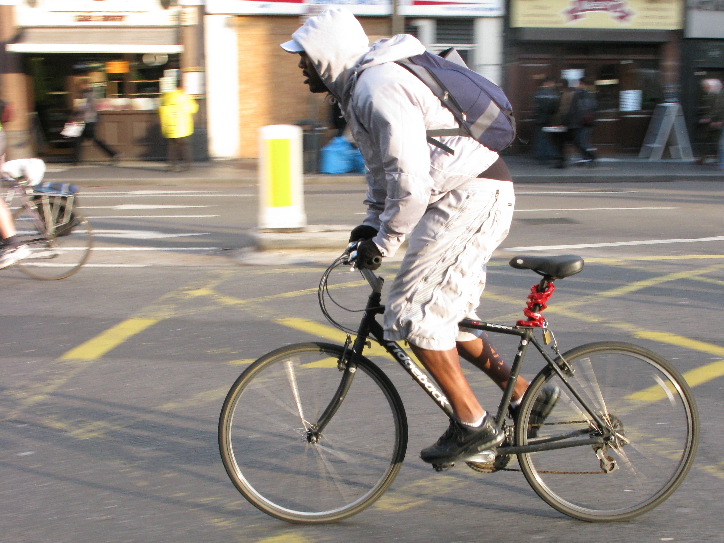 London bicycle courier